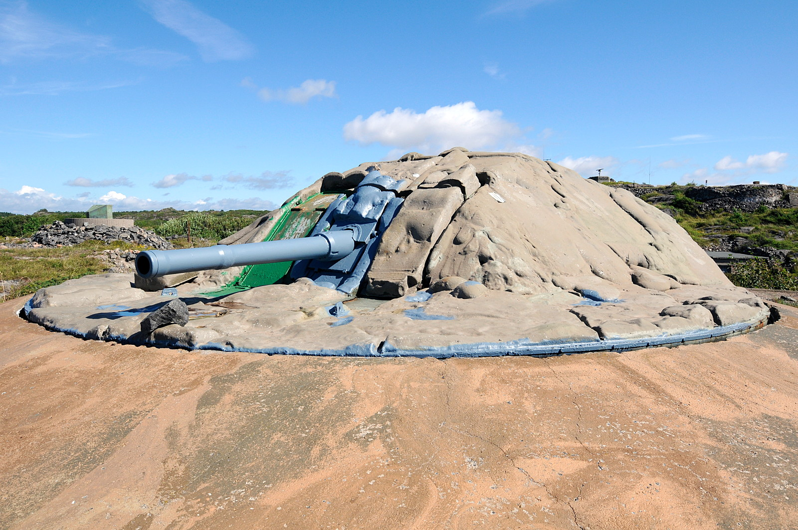 Kanon i paddeskjold